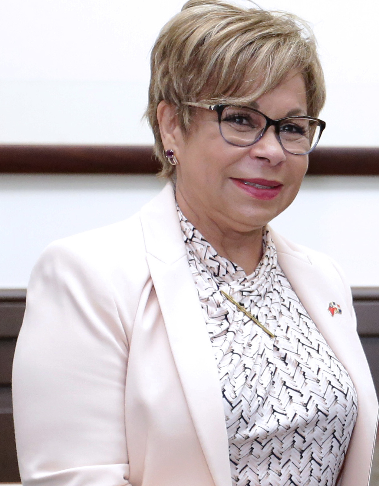 04.12 總統接見「多明尼加共和國駐臺大使阿布爾格格(Rafaela Alburquerque)」，於會後相互贈禮